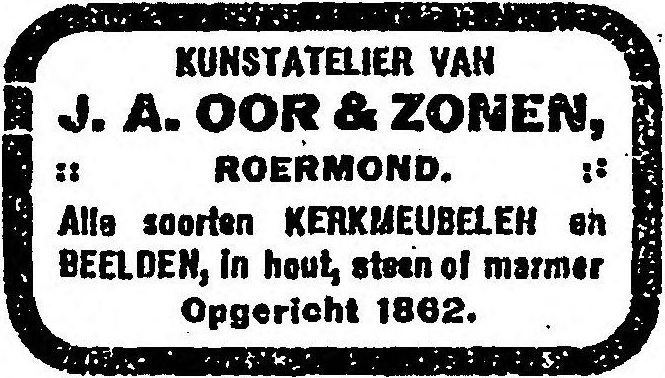 Advertentie Kunstatelier van J.A. Oor & Zonen, Roermond. Uit Het Centrum, maandag 6 april 1914, eerste blad, [p. 5].